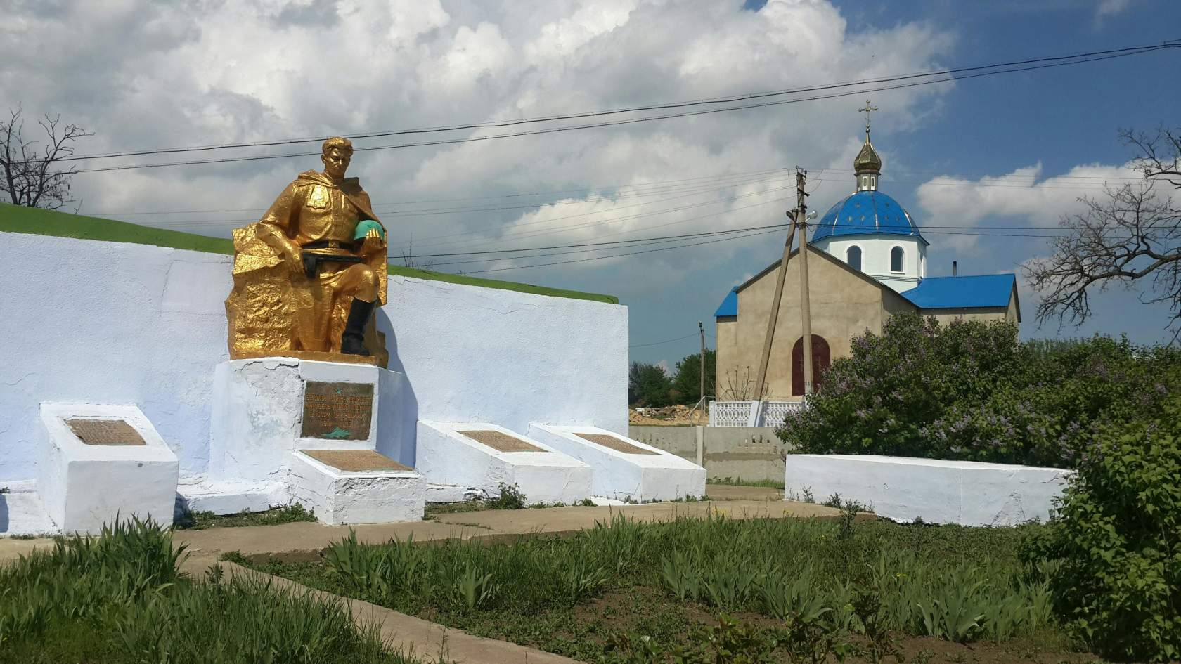 В центре села Новоукраинка.